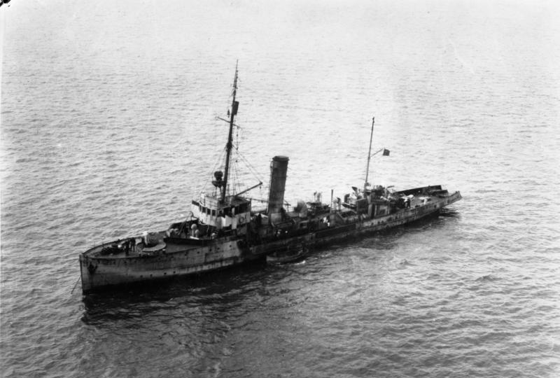 Minensuchboot vor Anker Serie M 1-26 Minensuchboote; Stapell: 1915; 19. Juni 1918: Boot vor Anker (Luftaufnahme)